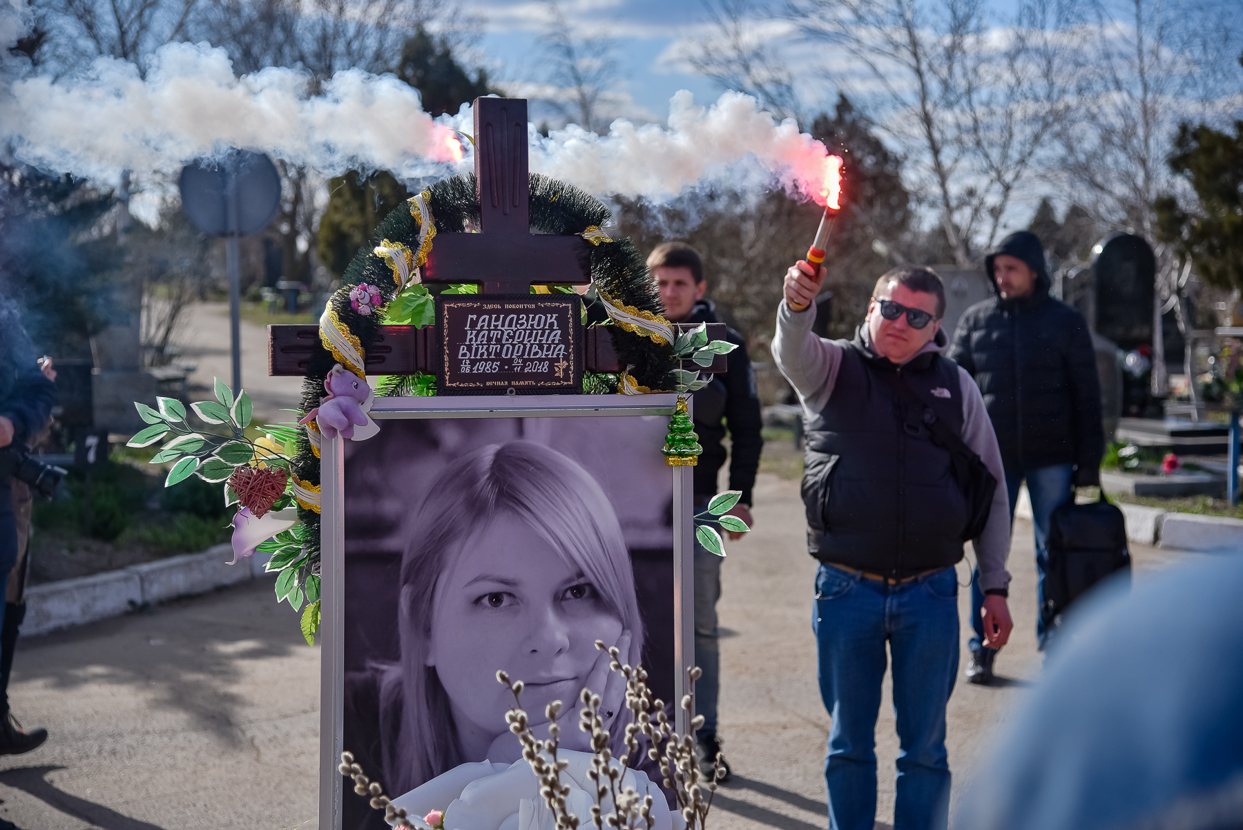 В Херсоні активісти та друзі Катерини Гандзюк провели кілька акцій, щоб нагадати - замовники вбивства Гандзюк досі на волі.